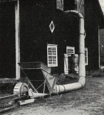 Höinjektor (höejektor) i bruk. Ursprunglig bildtext i Svenskt lantbrukslexikon: "Injektor. Fläkt med injektor för transport av hö och helsäd."